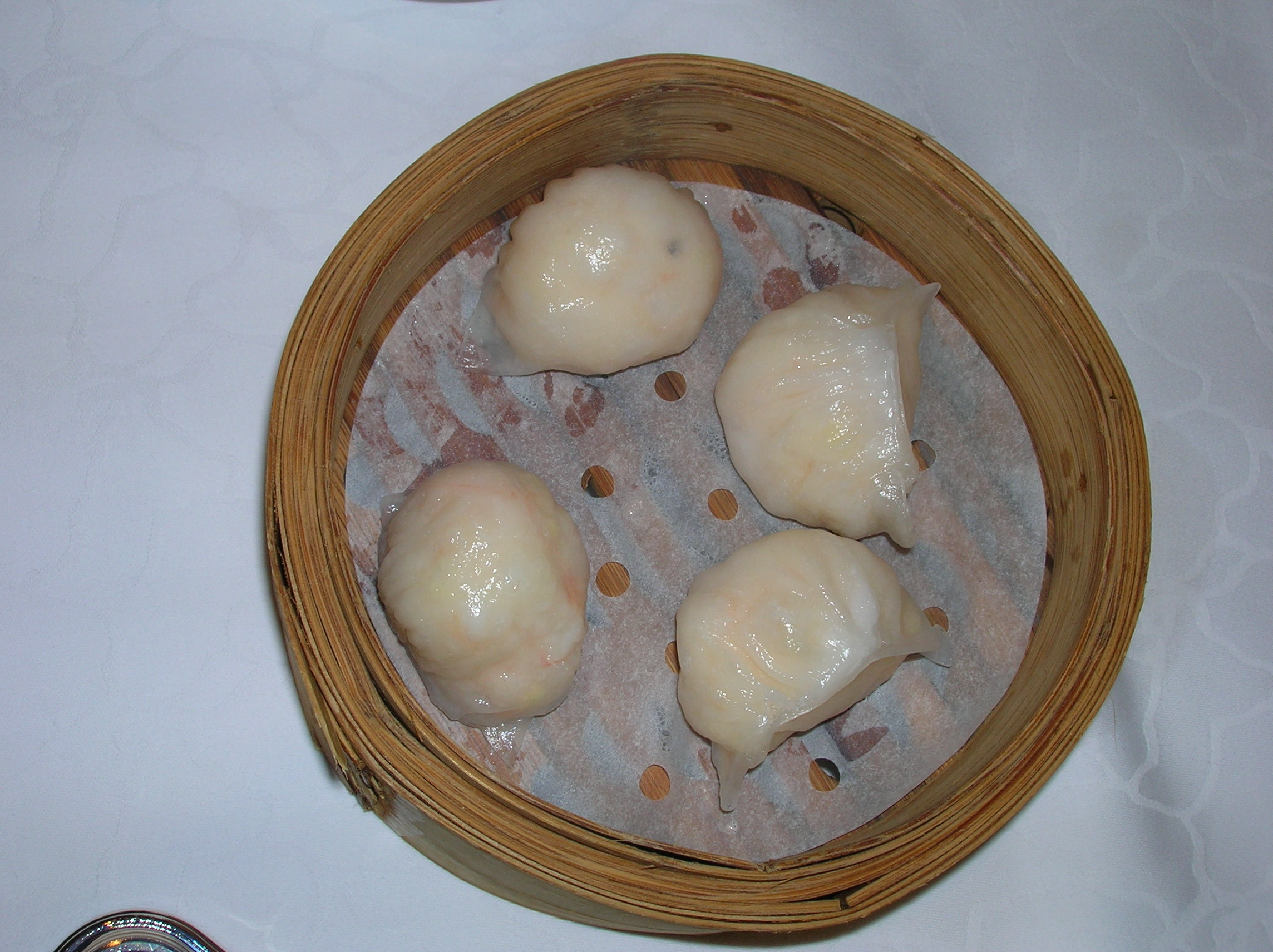 דים סאם במסעדת פוק לאם מון